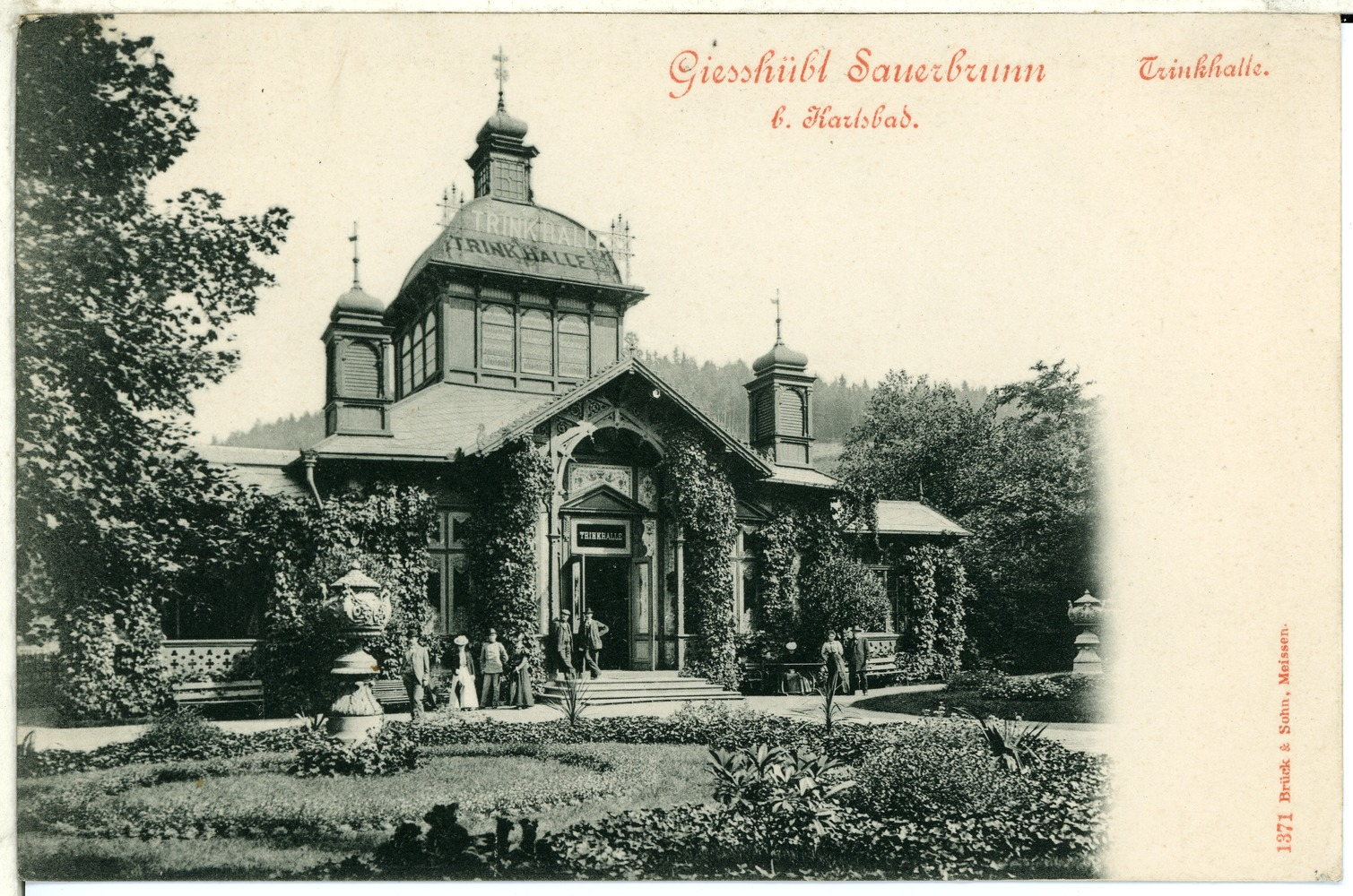 Gießhübl-Sauerbrunn; Trinkhalle This postcard is from publisher Brück & Sohn in Meißen ( This postcard has a unique number 01371 and is available in a higher resolution at the publisher. This images was uploaded in a cooperation project between Wikipedians and the publisher.